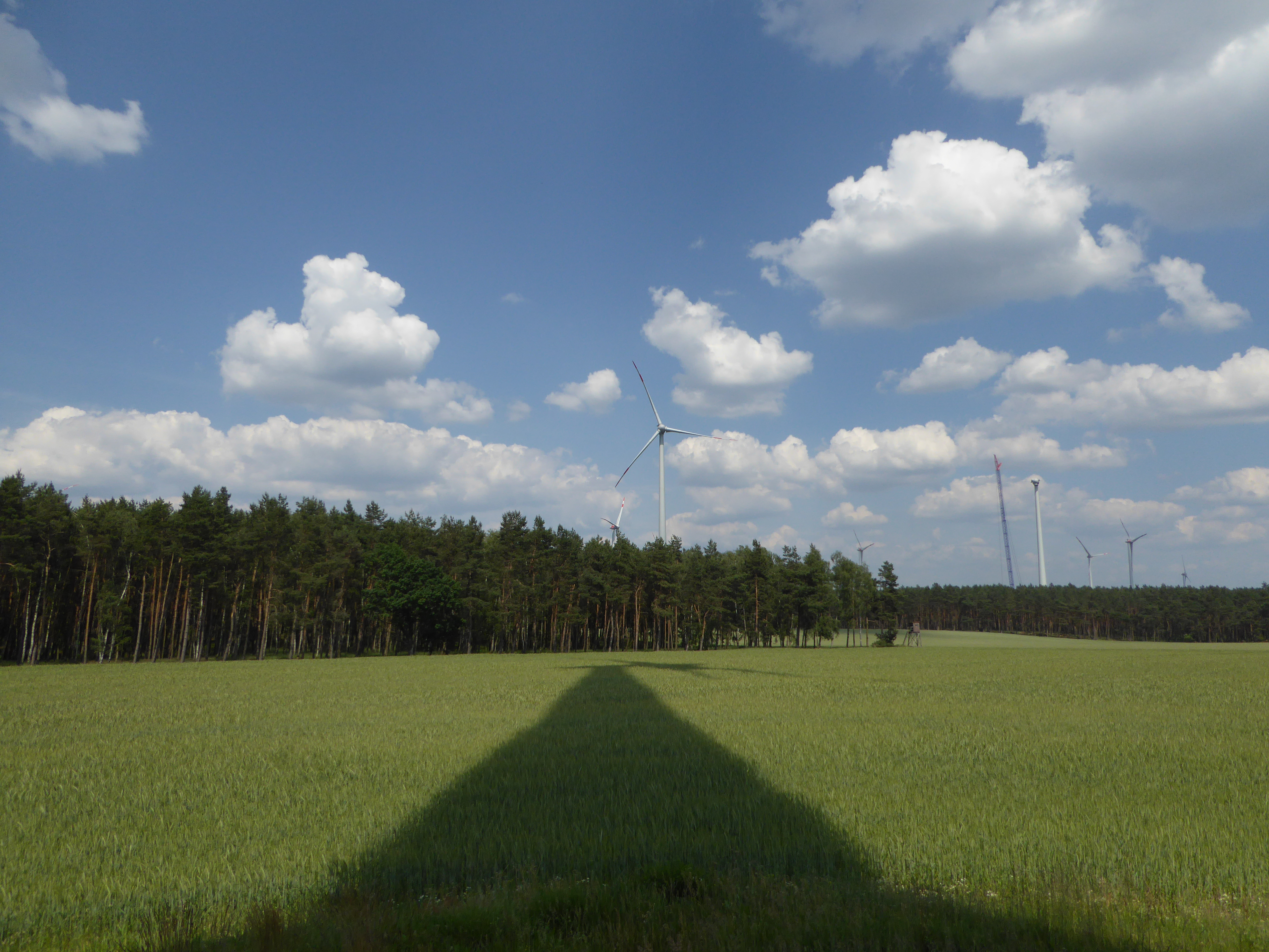 Feldheim-Treuenbrietzen